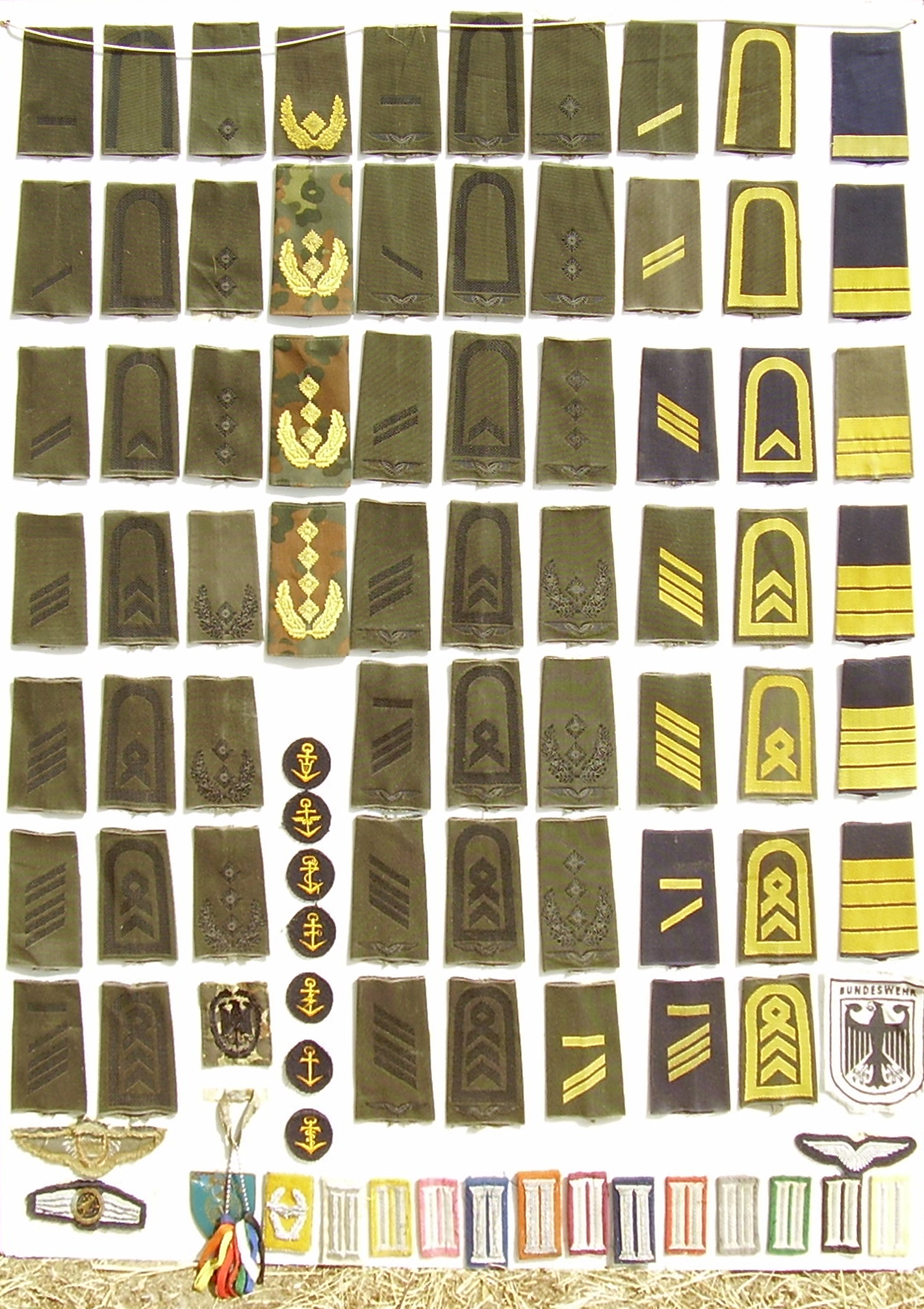 Bundeswehr Dienstgrad Tafel